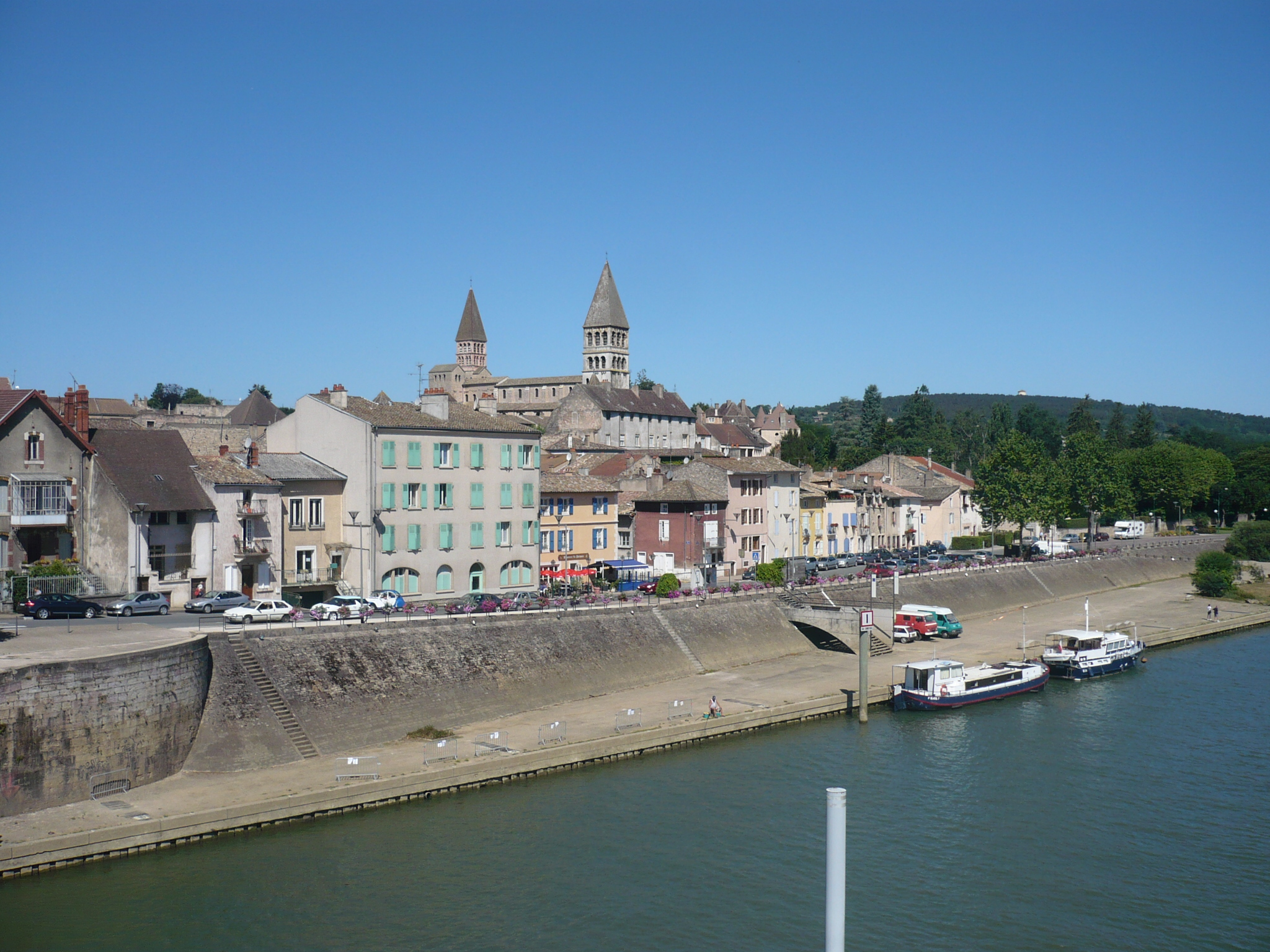 Saône/Tournus